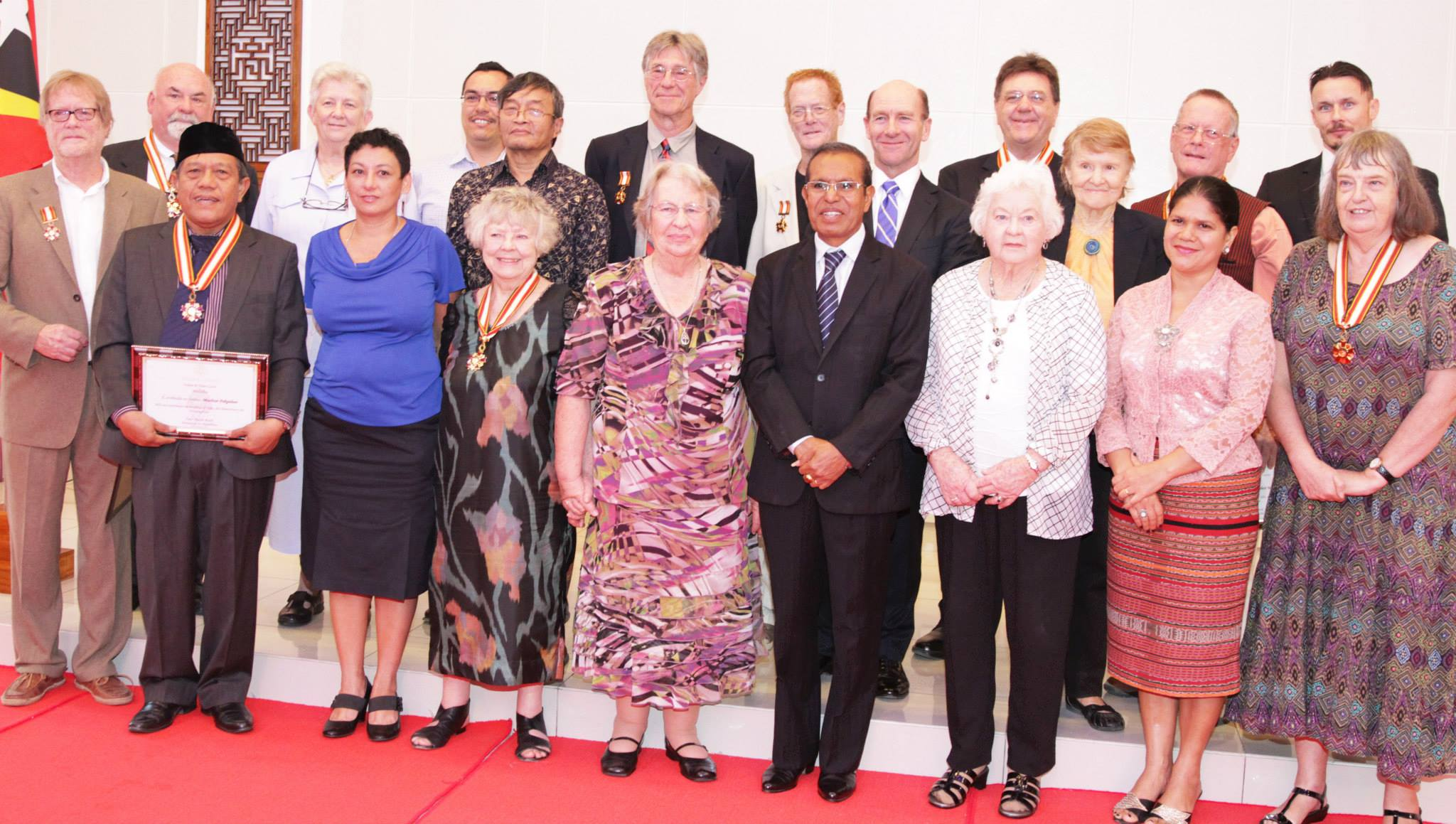 Verleihung des Ordem de Timor-Leste, 30. August 2014. Gruppenbild